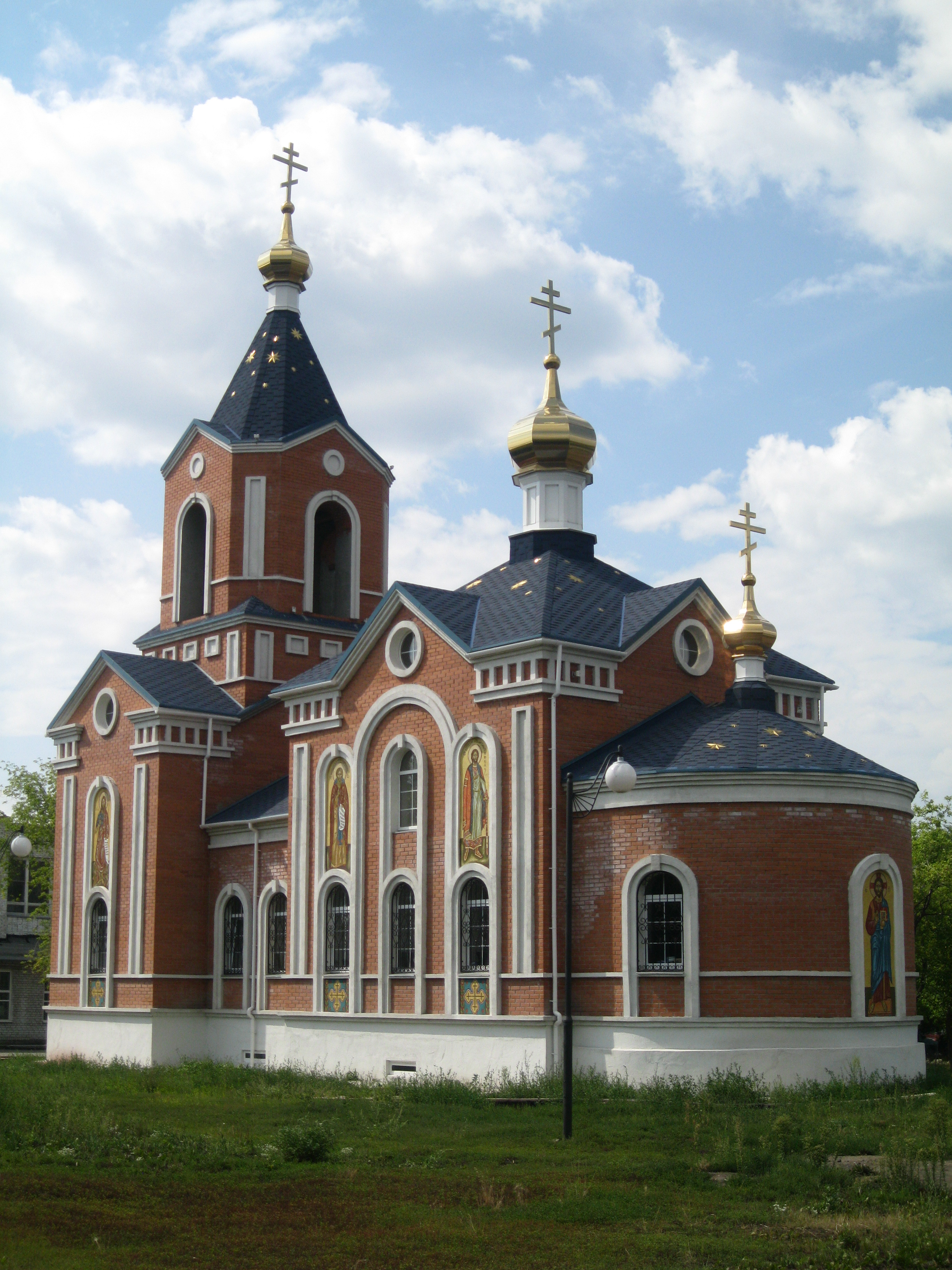 Церковь Порт-Артурской иконы Божией Матери в Кургане, Россия